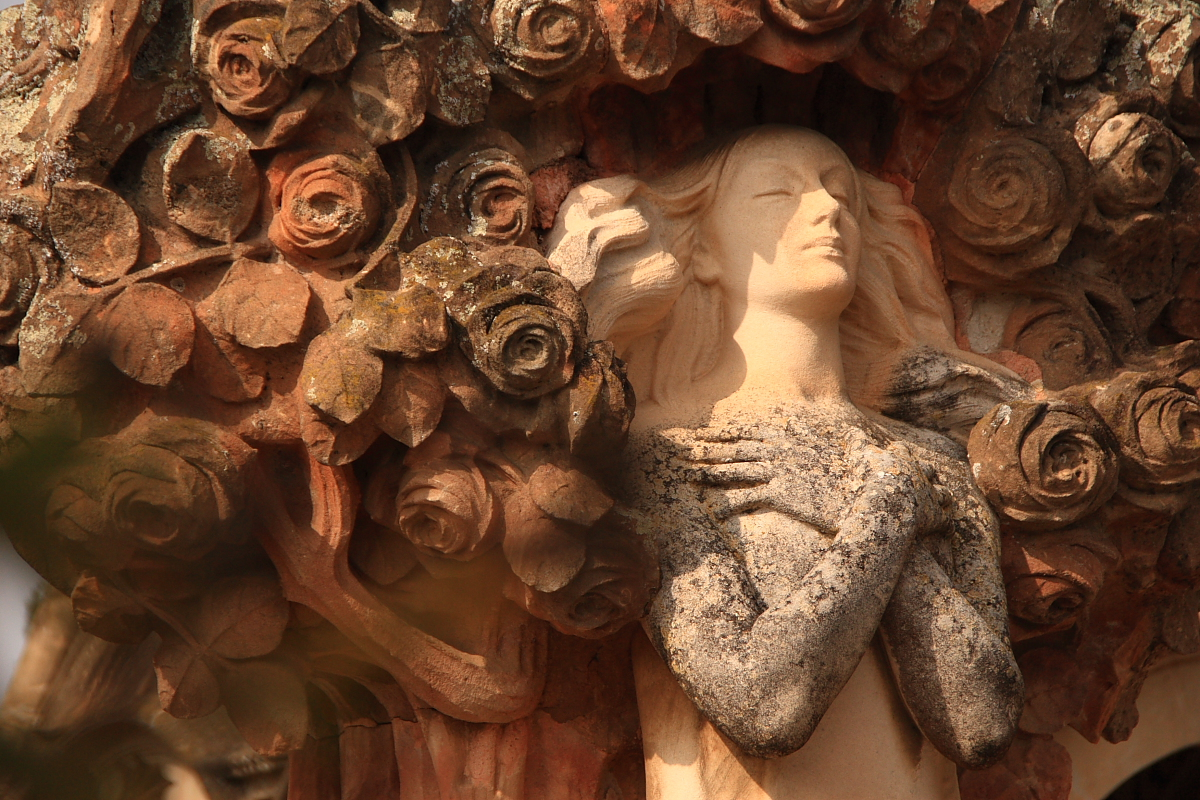 Hipogeu Camps-Nonell (1908) (Lloret de Mar-La Selva-Catalunya), obra d'Ismael Smith i Marí (1886-1972) dins del cementiri modernista de Lloret de Mar